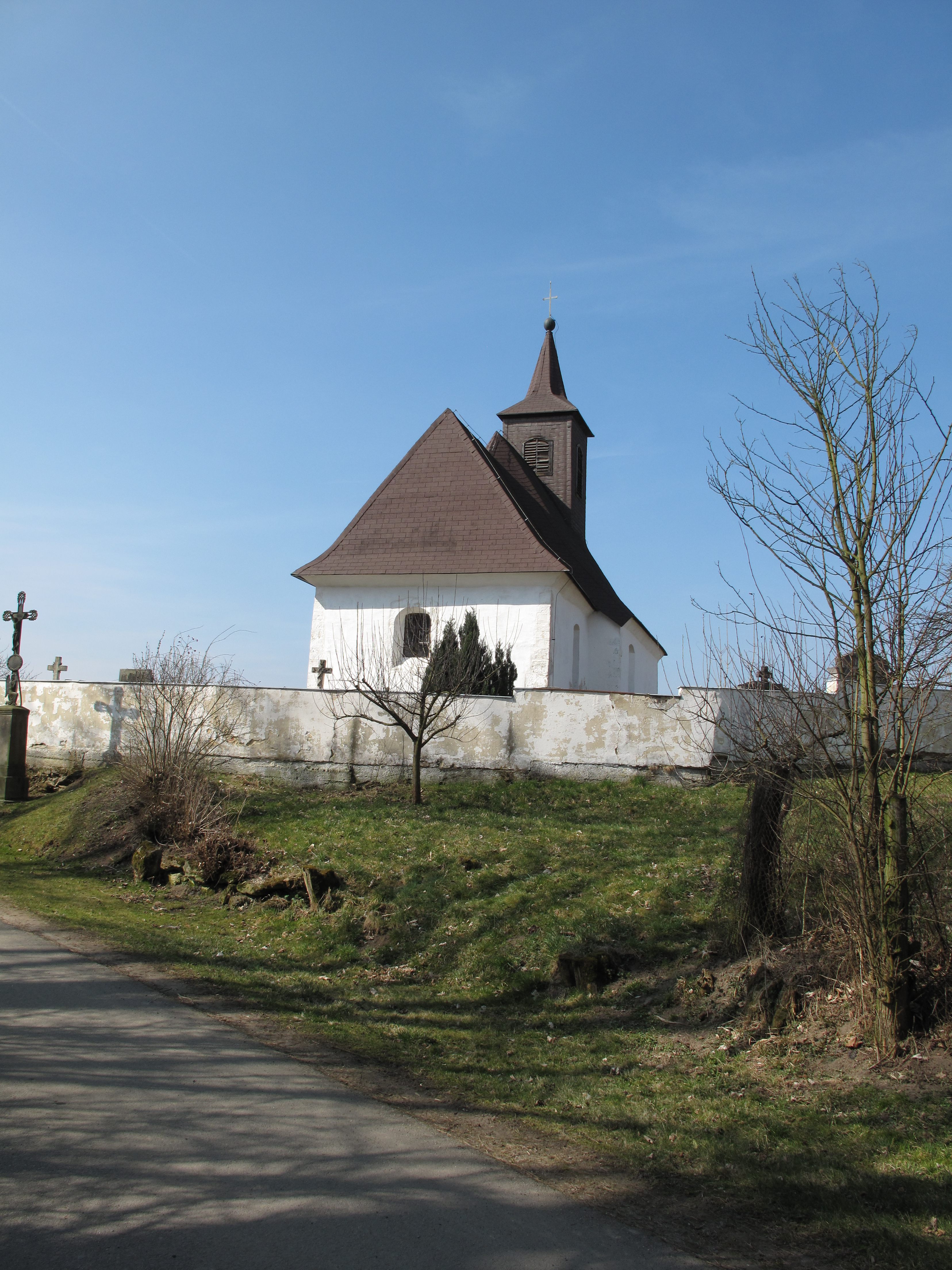 Kostel v Chocnějovicích. Okres Mladá Boleslav, Česká republika.